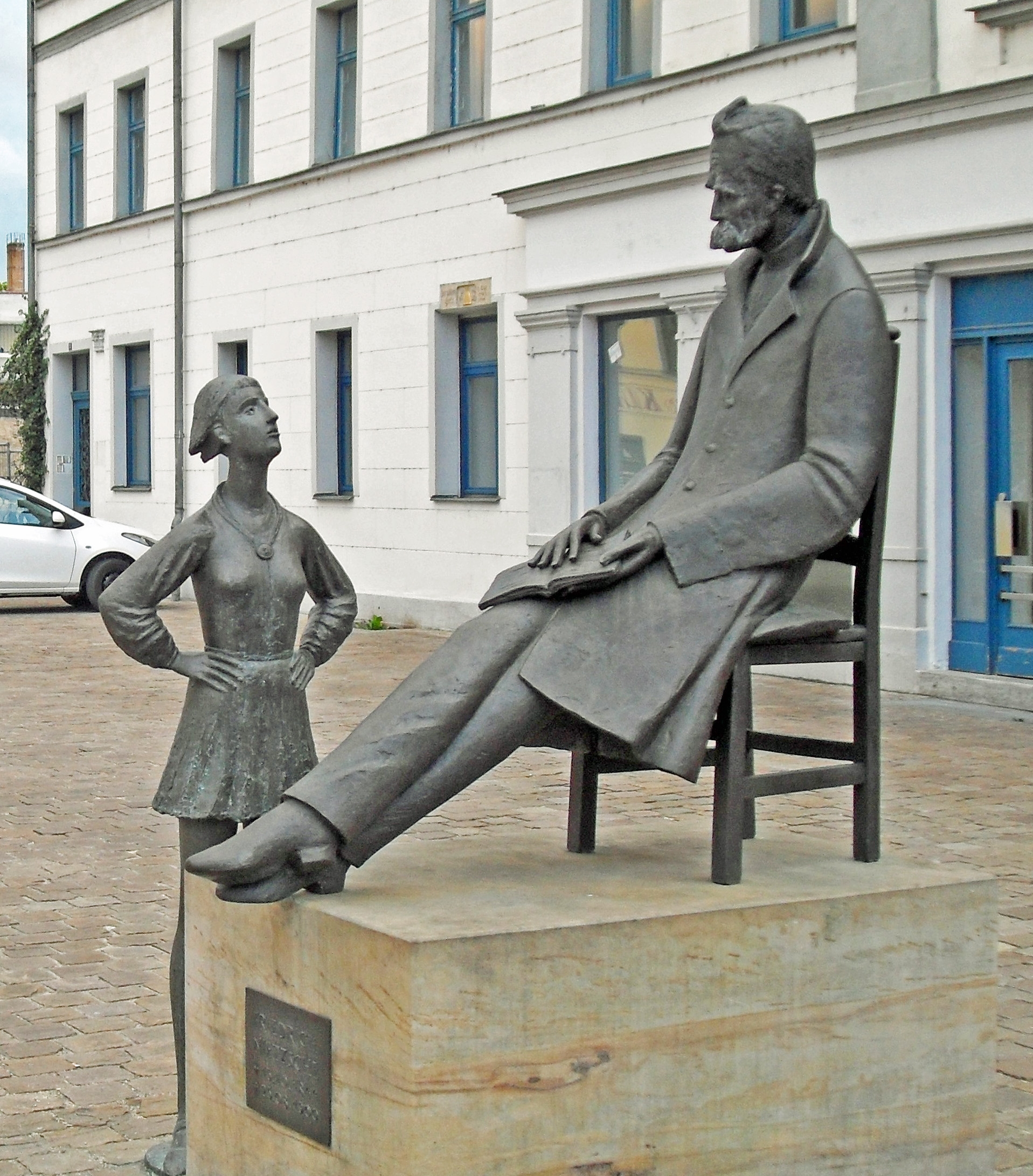 Nietzschedenkmal auf dem Holzmarkt in Naumburg, das am 16. Oktober 2007 eingeweiht wurde.